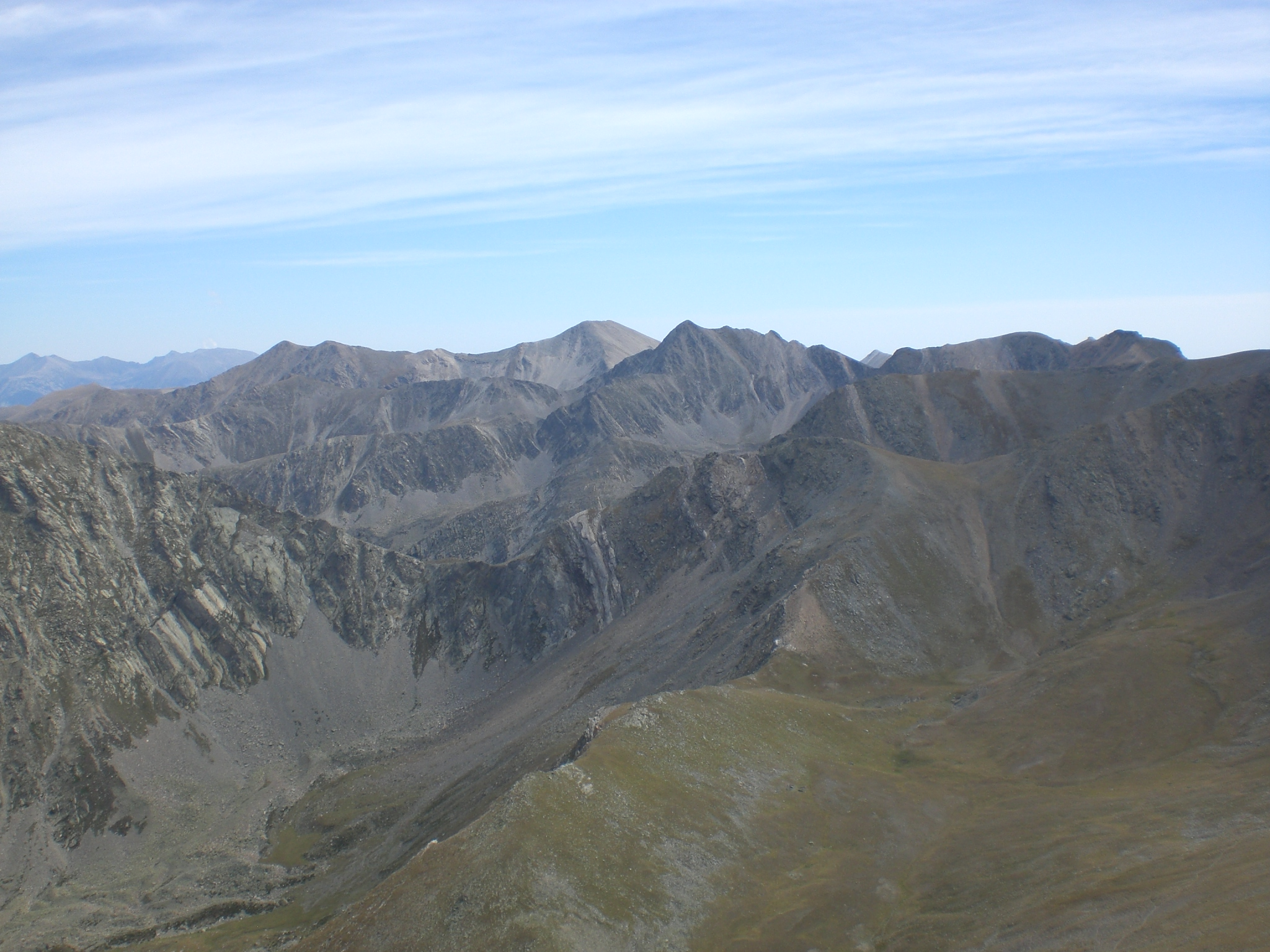 Vistes a l'est des del Noufonts (setembre 2011)